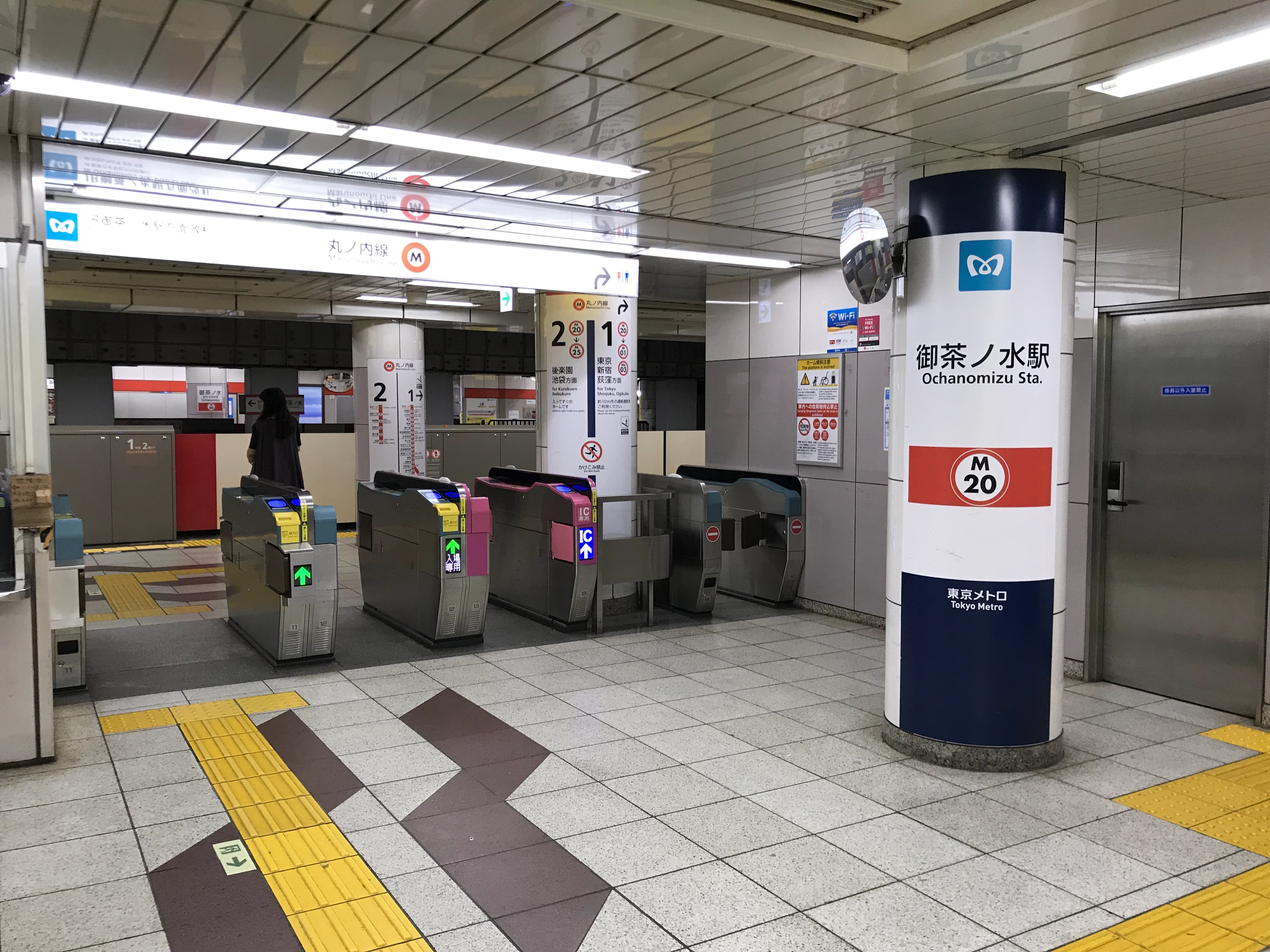 東京メトロ丸ノ内線御茶ノ水駅JR御茶ノ水駅方面改札口